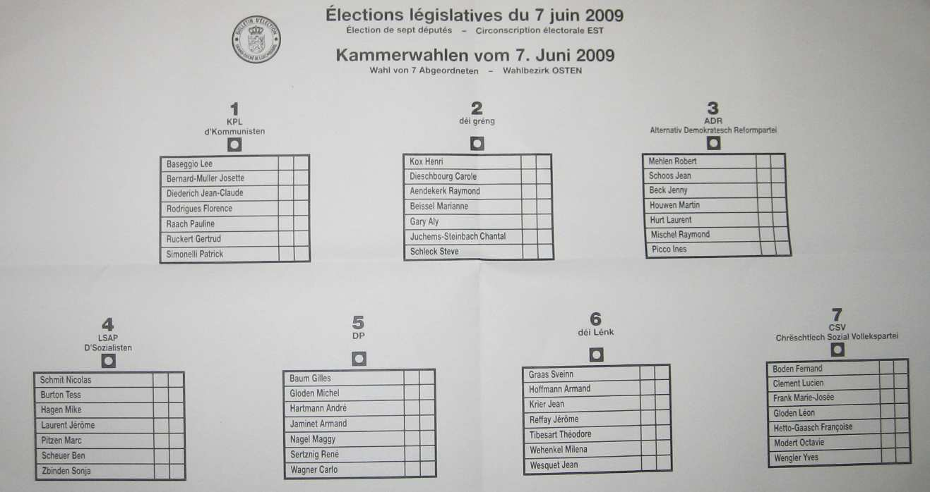 Sujet: Stëmmziedel fir d'Chamberwale vum 7. Juni 2009,Walbezierk Osten. Auteur: ofgeknipst vum user:zinneke